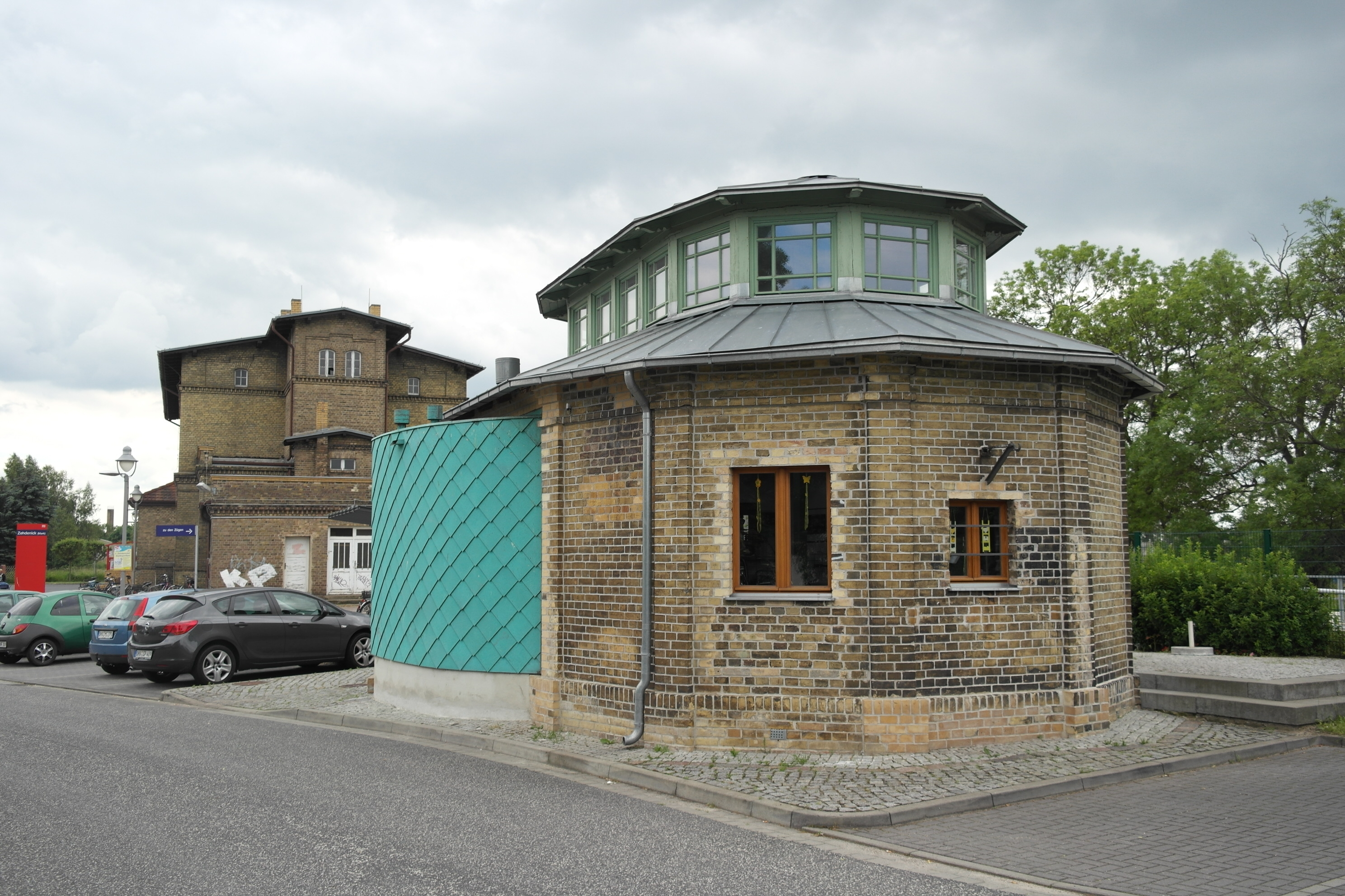 Bahnhof Zehdenick, Baudenkmal, Nebengebäude